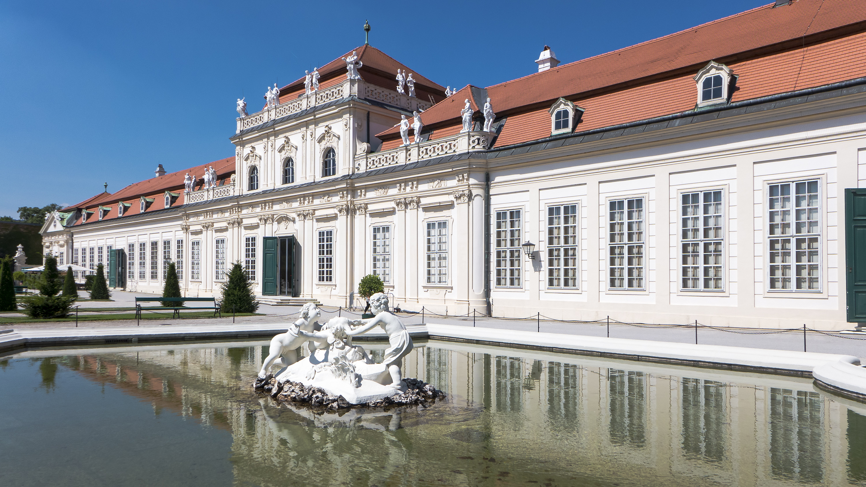 Belvederegarten in Wien 3